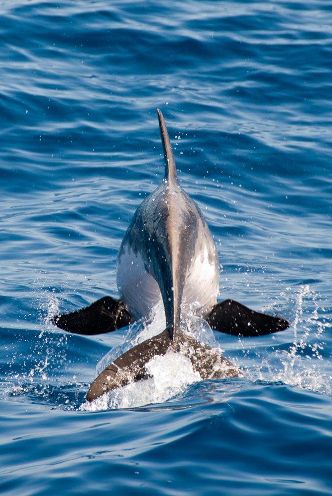 Steno bredanensis - delfín de diente rugoso - delfín de hocico estrecho.